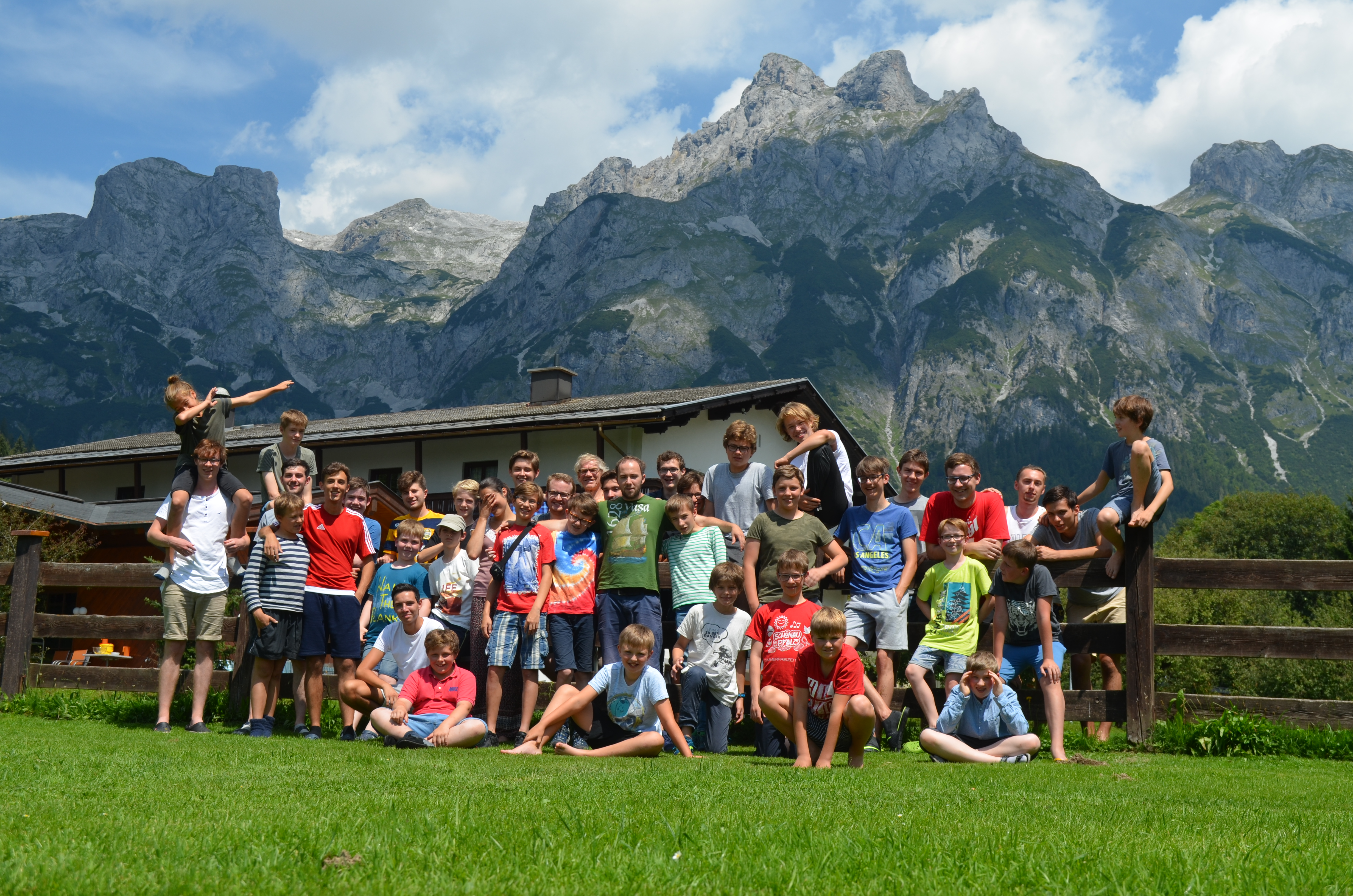 Die Kurrendaner vor dem Eiskogel während der Sommerfreizeit 2018 in Werfenweng